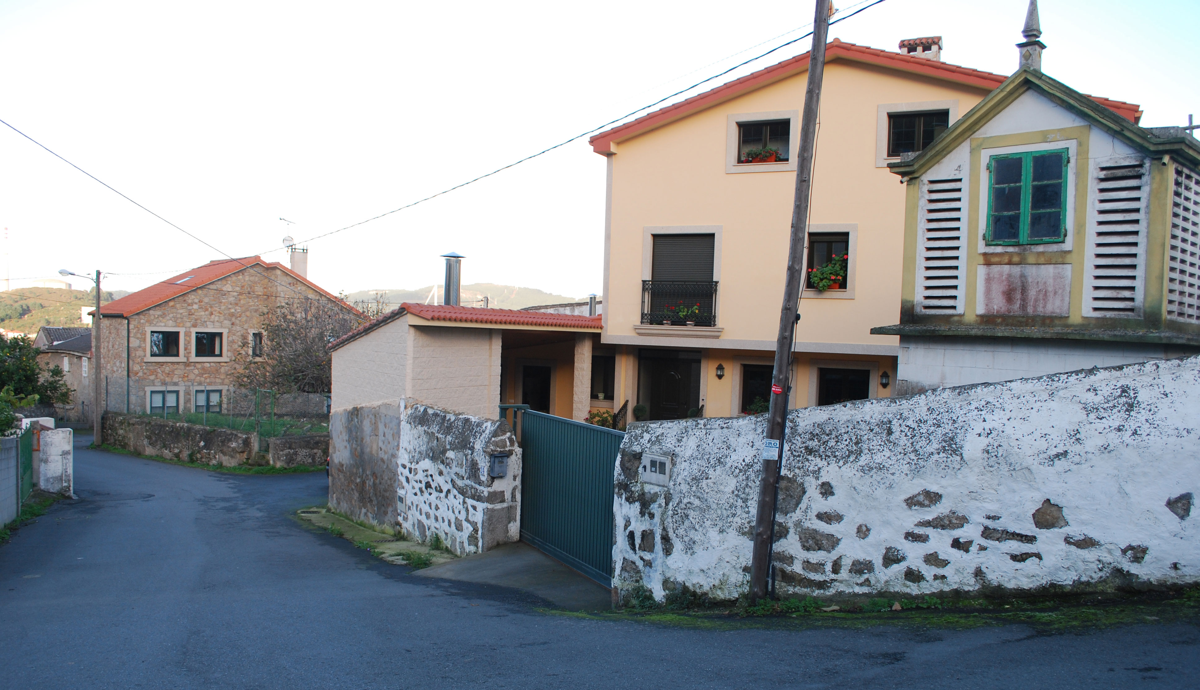 Vista da rúa en Figueiroa Arteixo A Coruña Galiza Spain